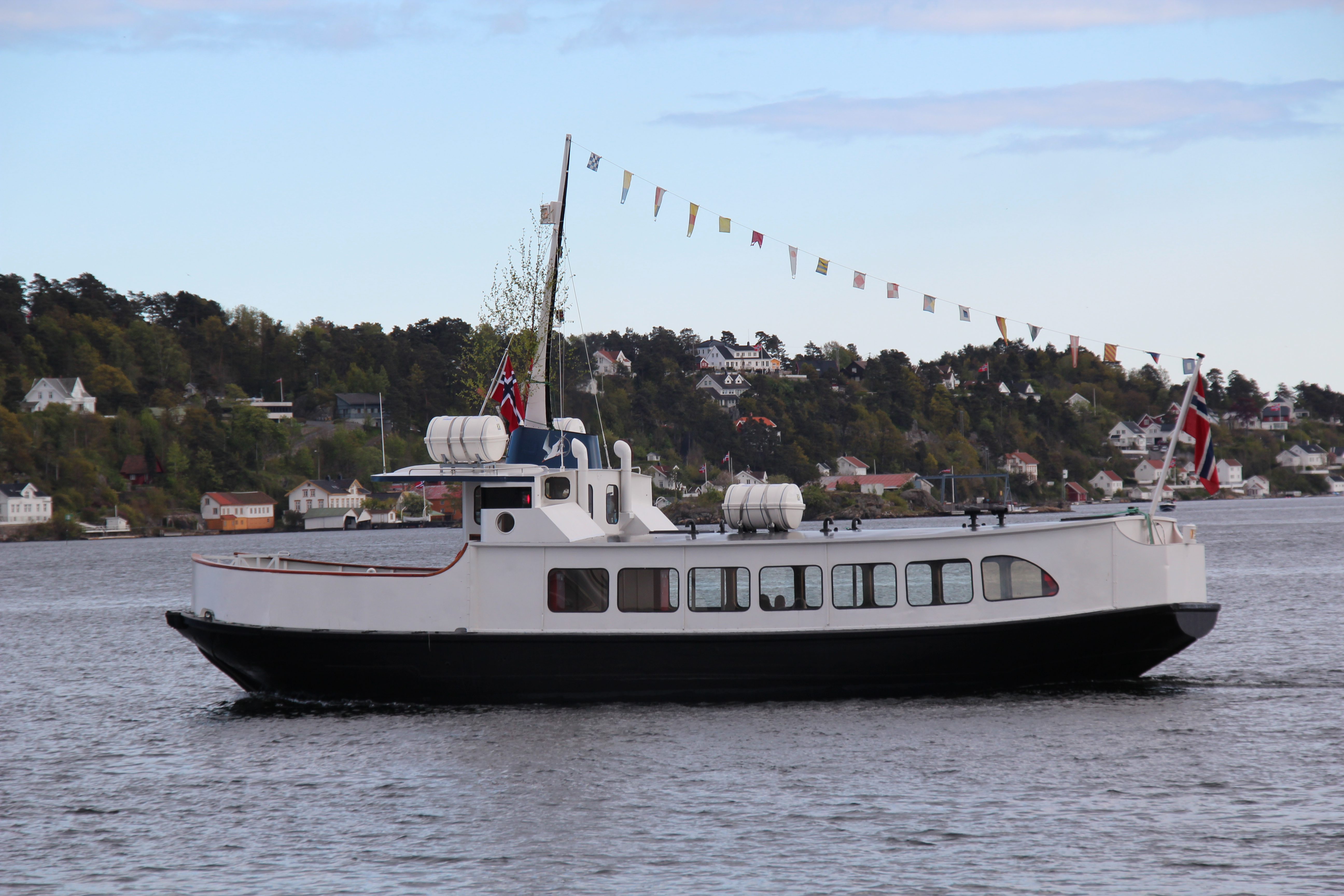 MF Tromøy II på vei fra Arendal til Skilsø på Tromøy.